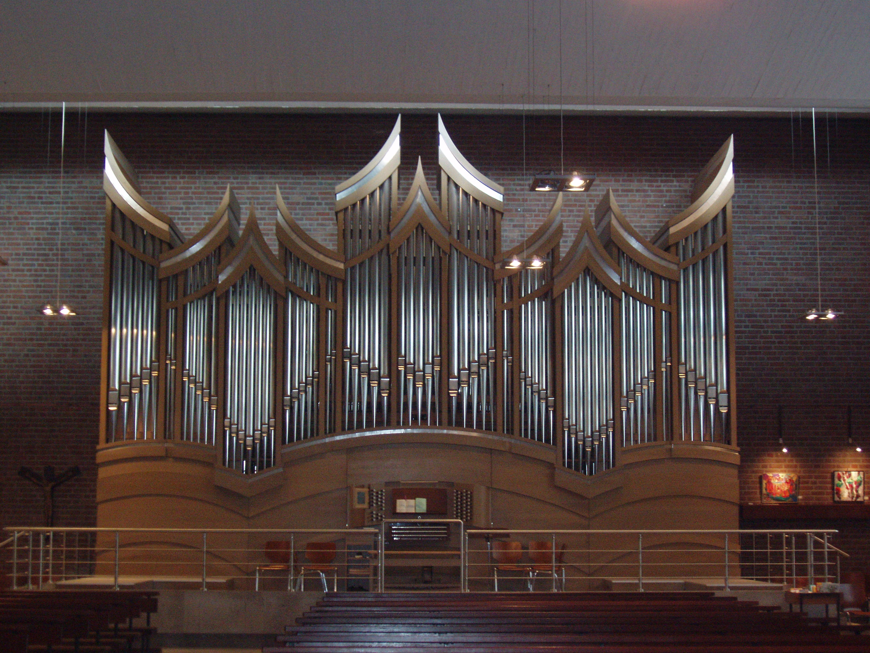 Orgel der St.-Martinus-Kirche, vom Altar aus